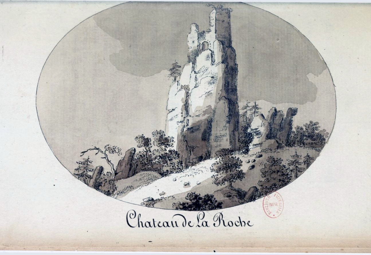 Vue du château de la Roche près de Bellefosse par François Walter, dans Jean Massenet (1748-1824), Description du Ban-de-la-Roche, Strasbourg, 1797.